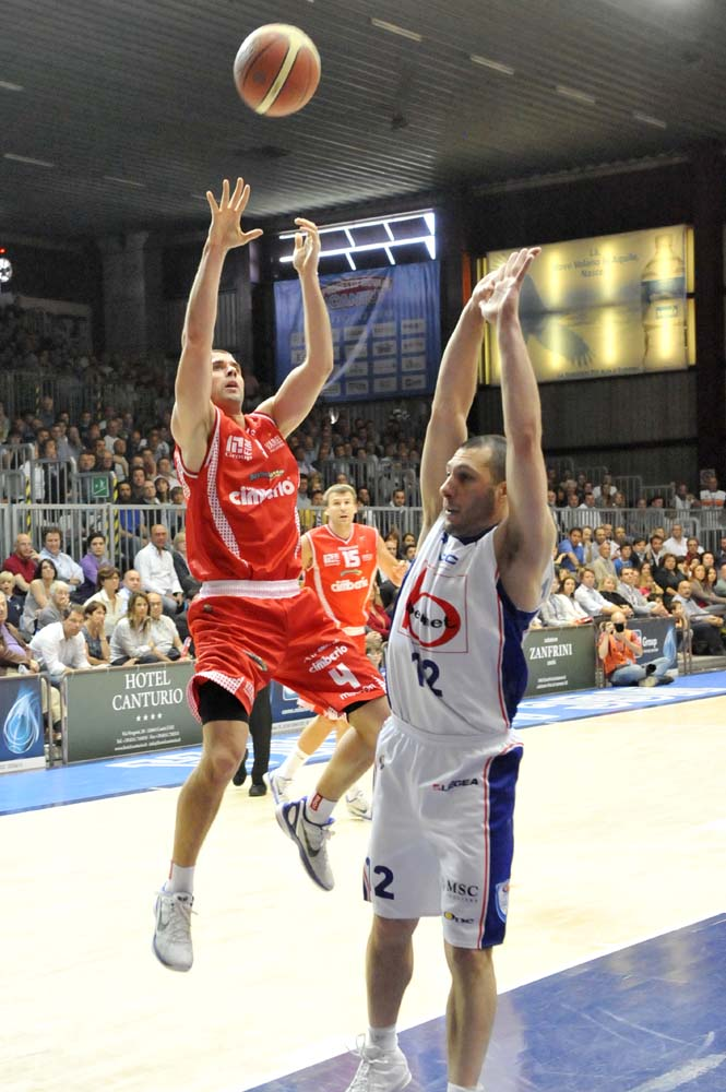 I cestisti Demartini e Mazzarino